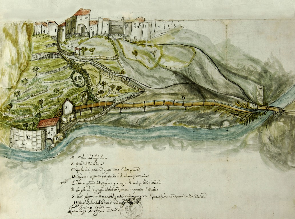 Veduta del mulino del signor Siervo di Lagonegro (PZ) disegnata da Antonio Cascino; le macchine idrauliche sono posizionate a ridosso di canali di derivazione dell'acqua, sopraelevati per un lungo tratto su pali di legno, 1827 (AS Potenza, Fondo Intendenza di Basilicata, b. 622, fasc. 548)